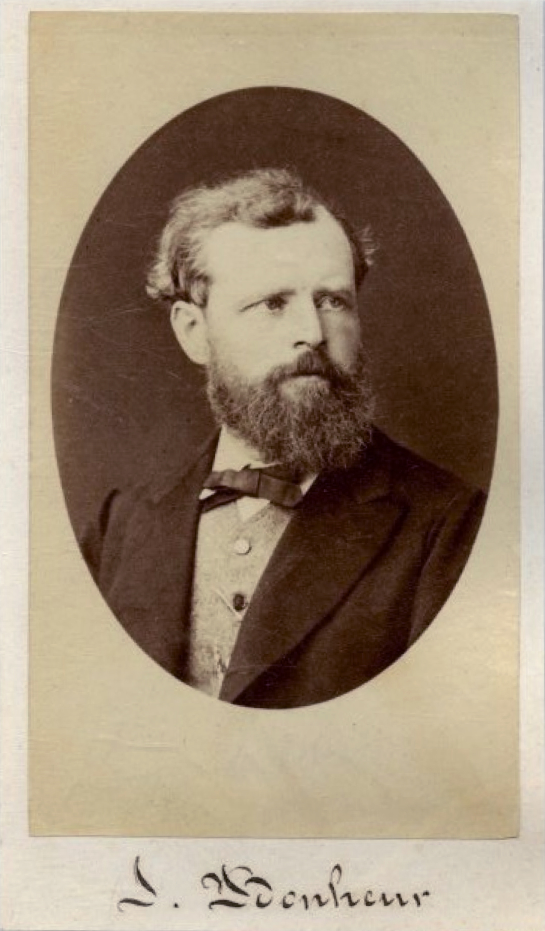 Isidore Bonheur